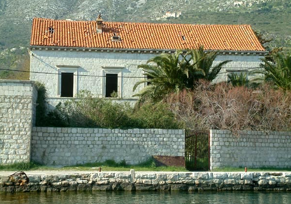 Foto personale.